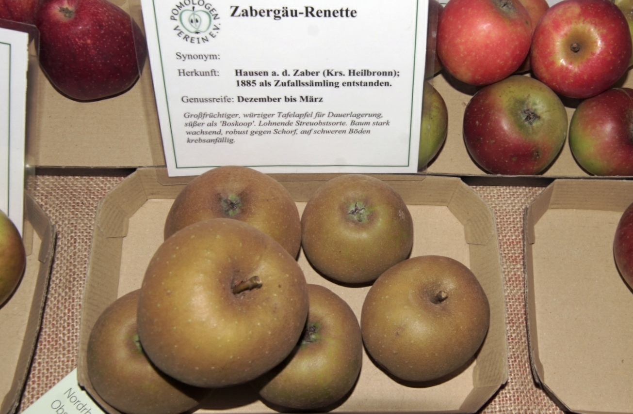 Herkunft Hausen an der Zaber im Kreis Heilbronn, Zufallssämling selektiert um 1885